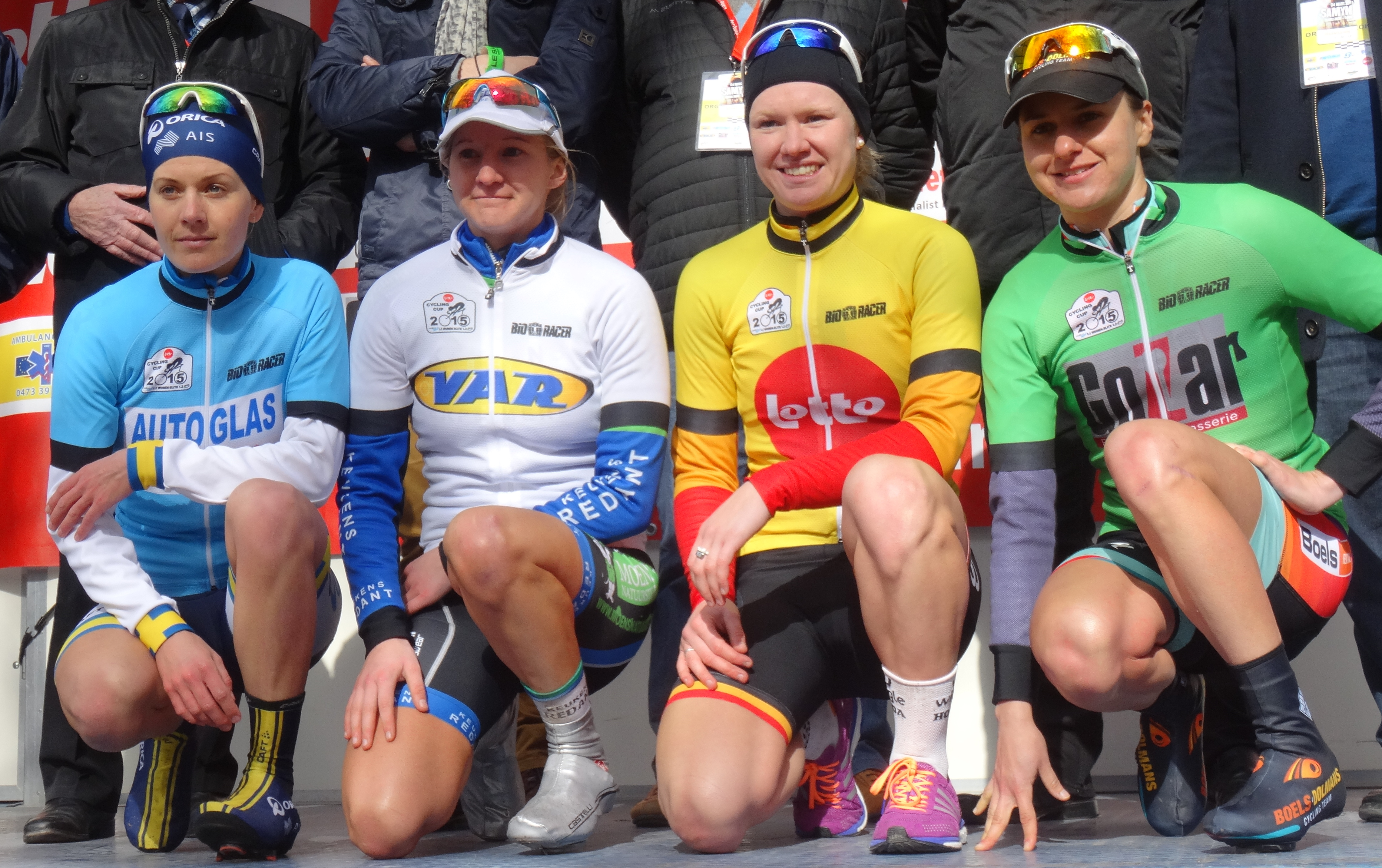 Reportage réalisé le mercredi 4 mars à l'occasion de l'arrivée du Samyn des Dames 2015 et du Samyn 2015 à Dour, Belgique.